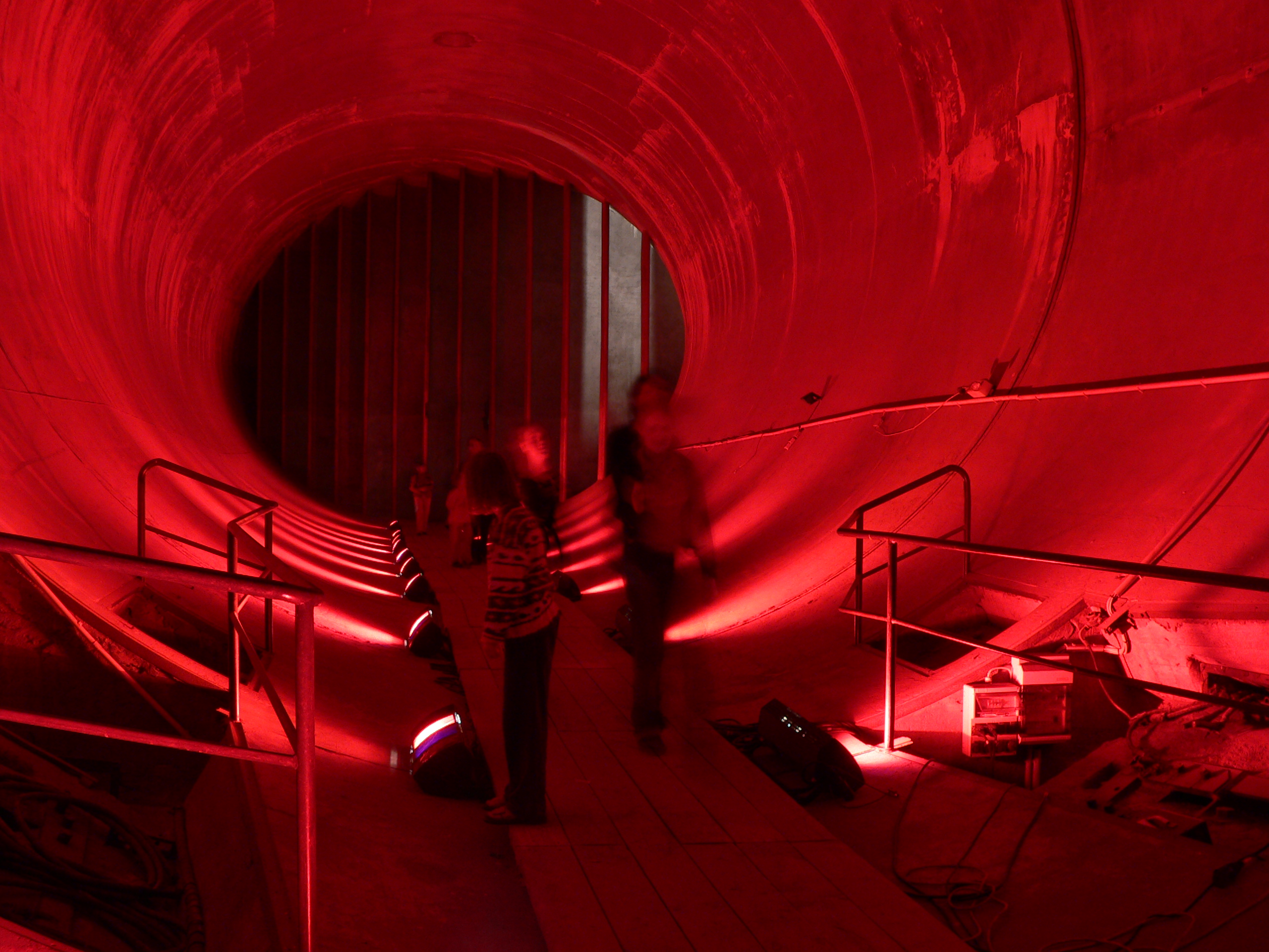 Windkanal aus den 30ger Jahren in Berlin Adlershof bei der "Langen Nacht der Wissenschaften" / wind tunnel from around 1930 in Berlin Adlershof